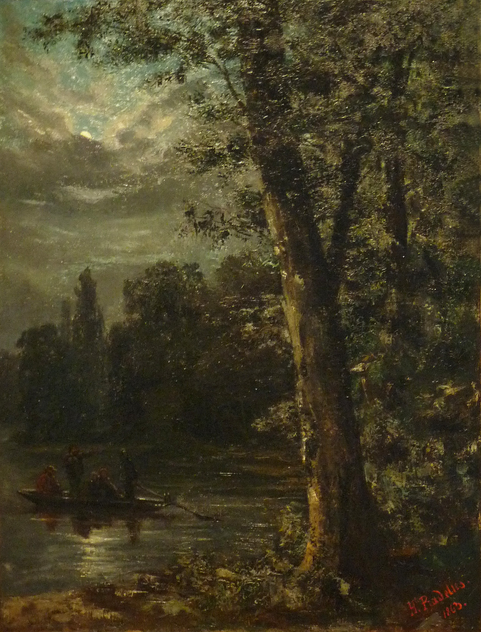 Hippolyte Pradelles (Strasbourg 1824-Bordeaux 1913), Promenade en bateau au clair de lune ou L'Echo interrogé, huile sur toile, Musée des beaux-arts de Strasbourg